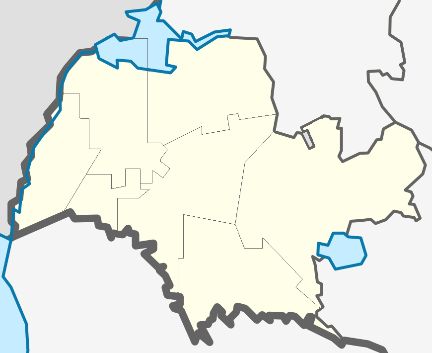 Карта Сланцевского района Ленинградской области с делением на муниципальные образования.